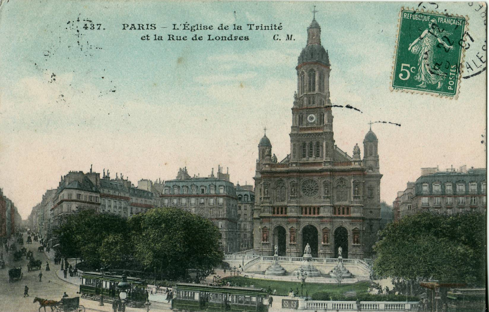 Carte postale ancienne éditée par CM N°437PARIS : L'église de la Trinité et la rue de LondresAu premier plan, les tramways de la ligne Enghien - Trinité